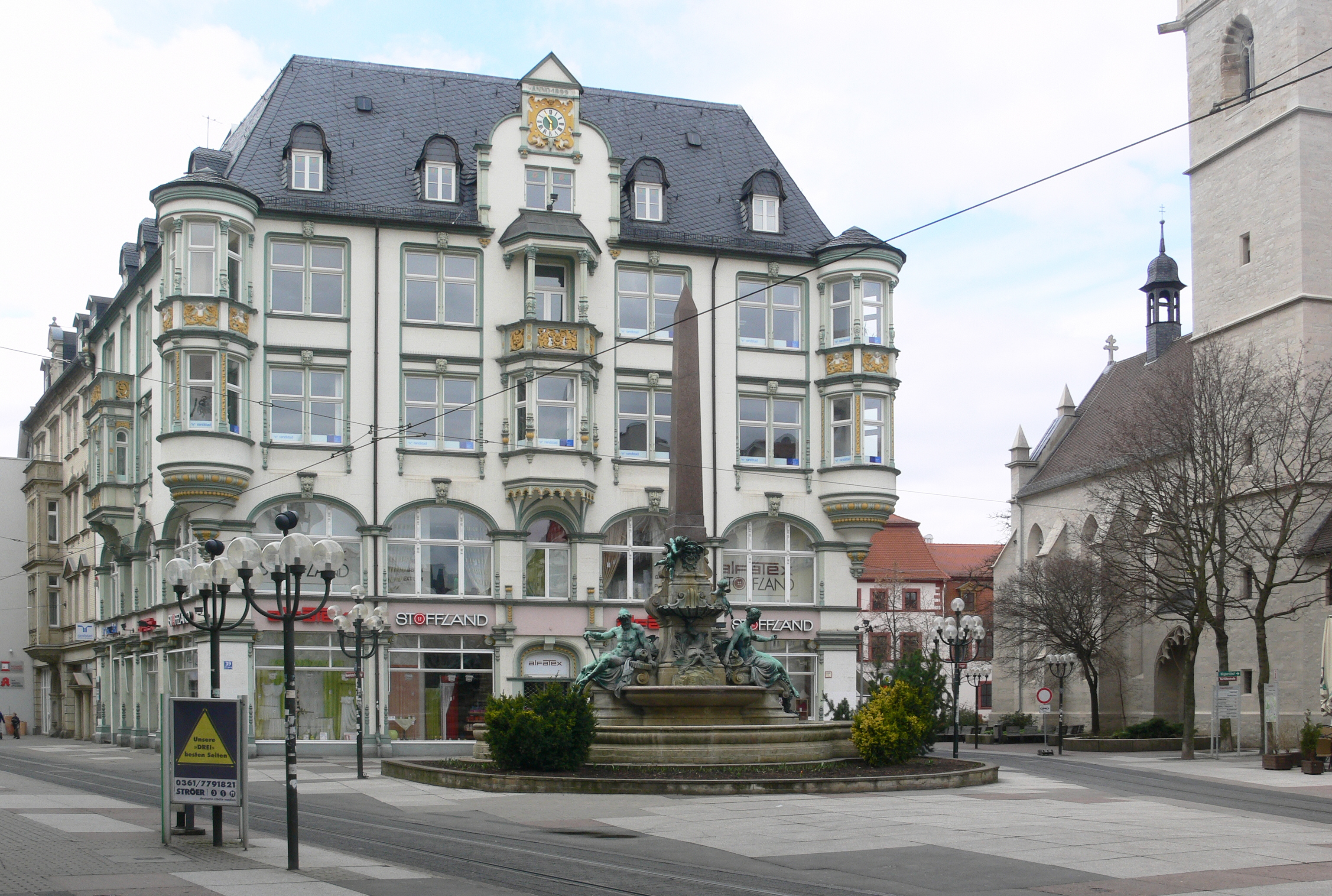 Erfurt, Angerbrunnen und Haus Anger 39-40